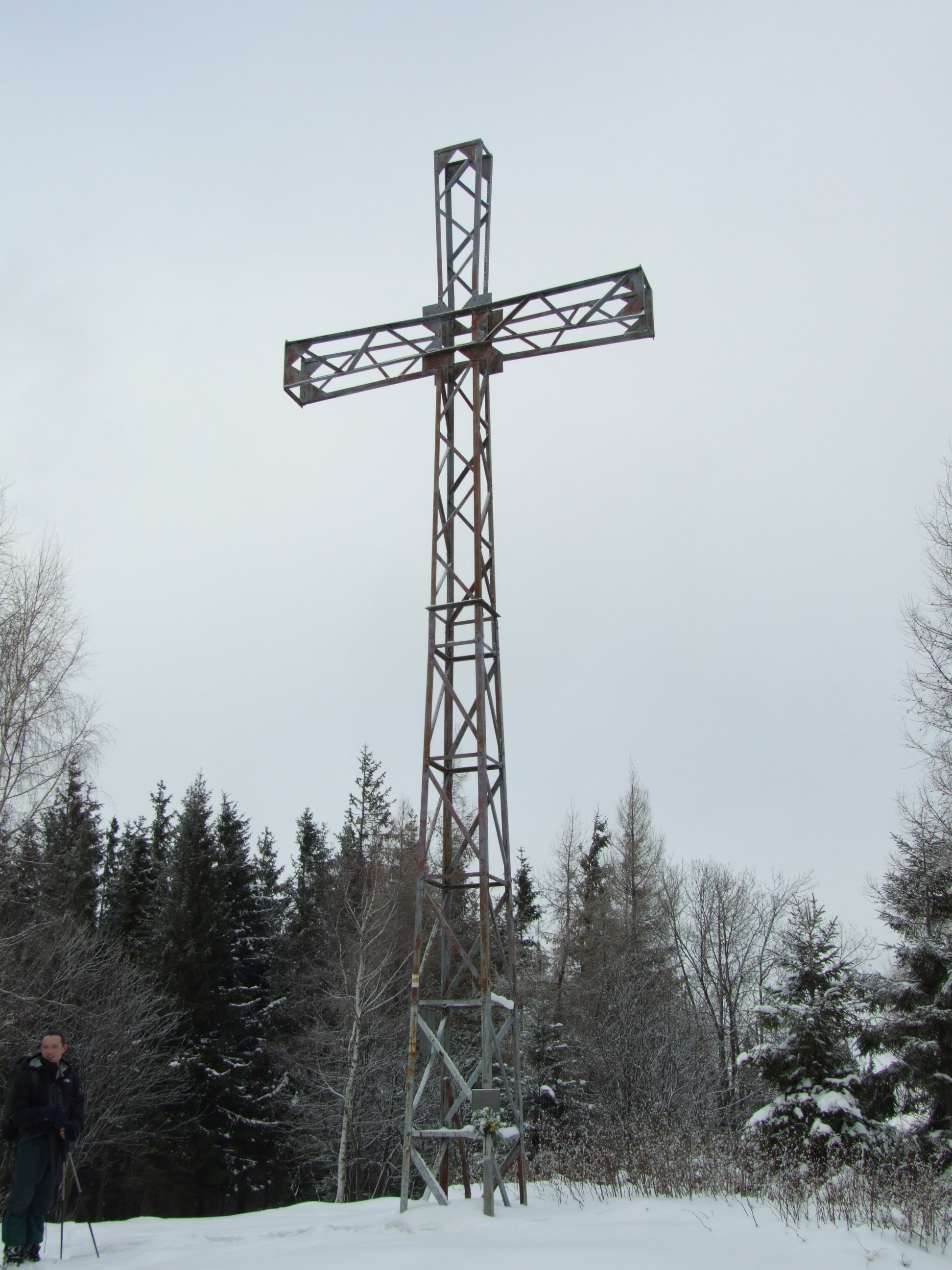 Krzyż na szczycie Jawornicy w Beskidzie Małym